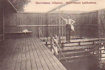 Gamla bilder från Norrvikens Villastad